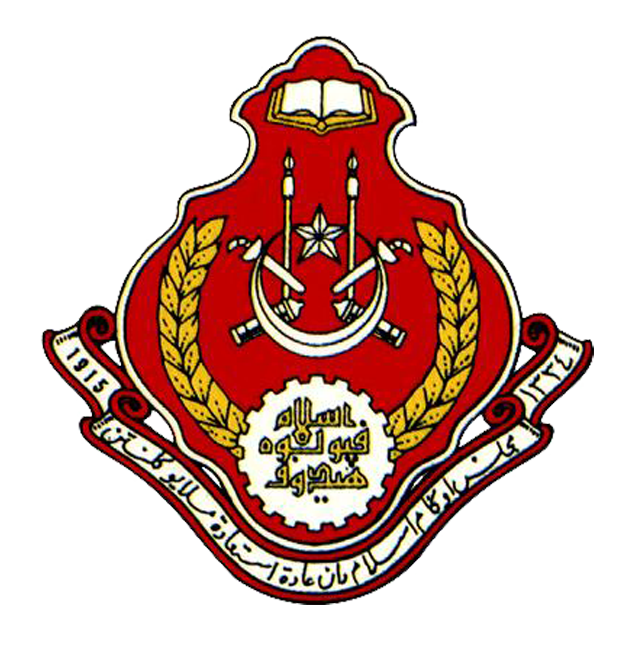 Logo Rasmi MAIK